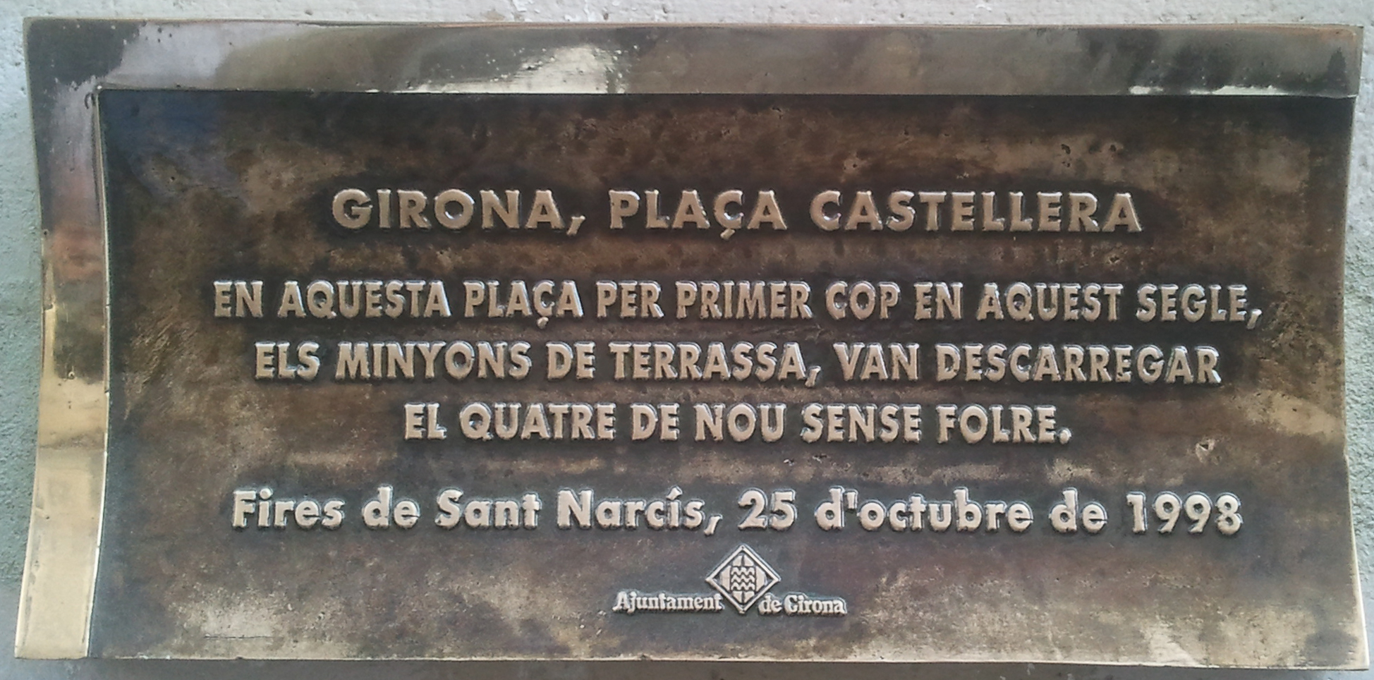 Placa dedicada als Minyons de Terrassa a la Plaça del Vi en motiu del 4 de 9 sense folre del 25 octubre de 1998.